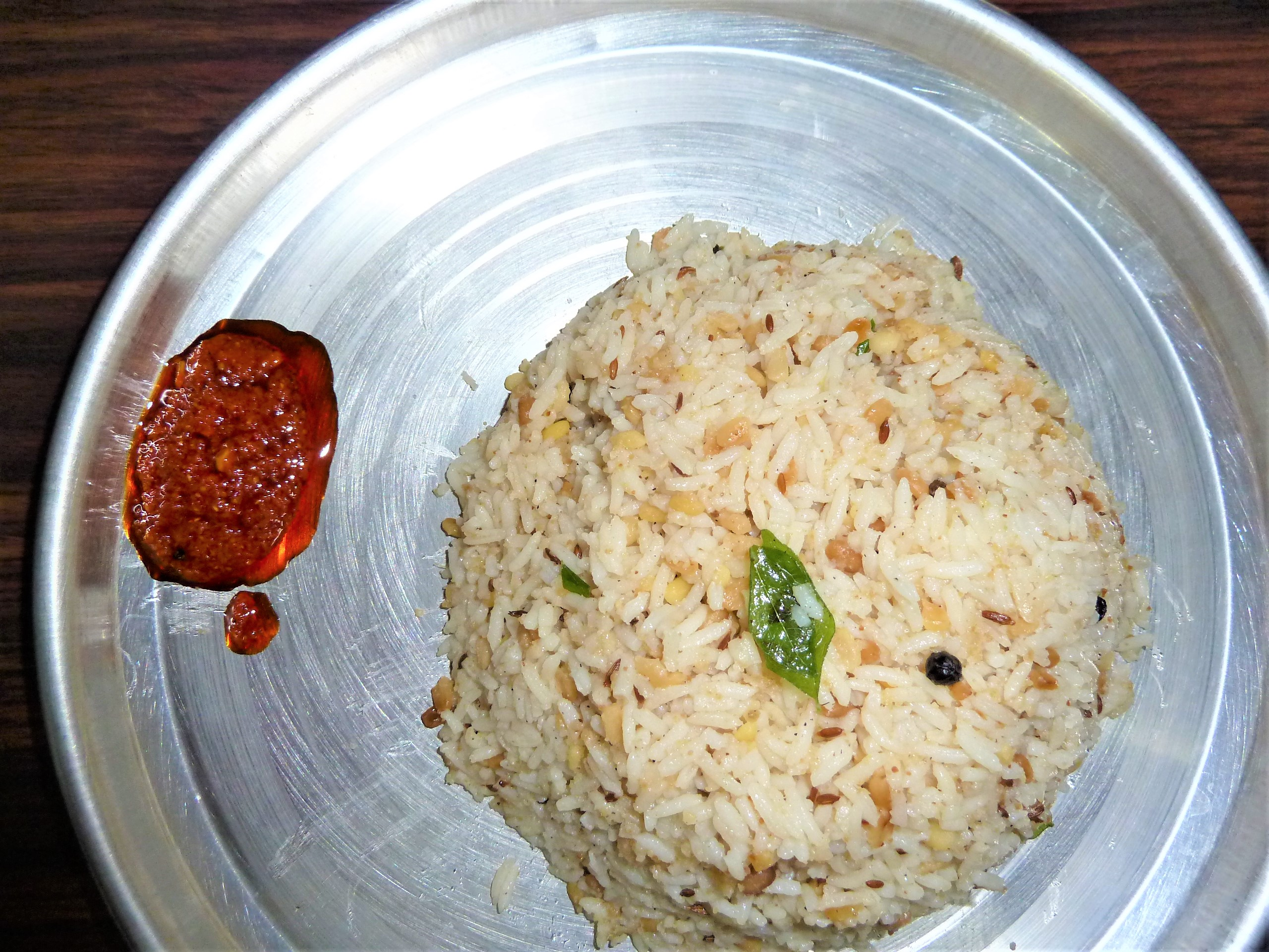 పొంగలి